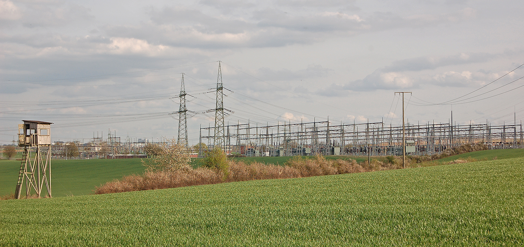 Umspannwerk Pulverdingen auf Markgröninger Gemarkung (von Nordwesten)